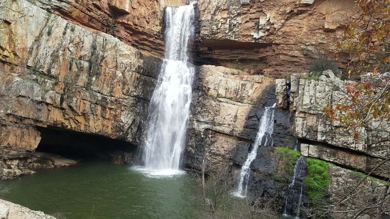 Cascada de Cimbarra This is a photography of a Site of Community Importance in Spain with the ID: ES6160003. Natura2000 entry, EEA entry